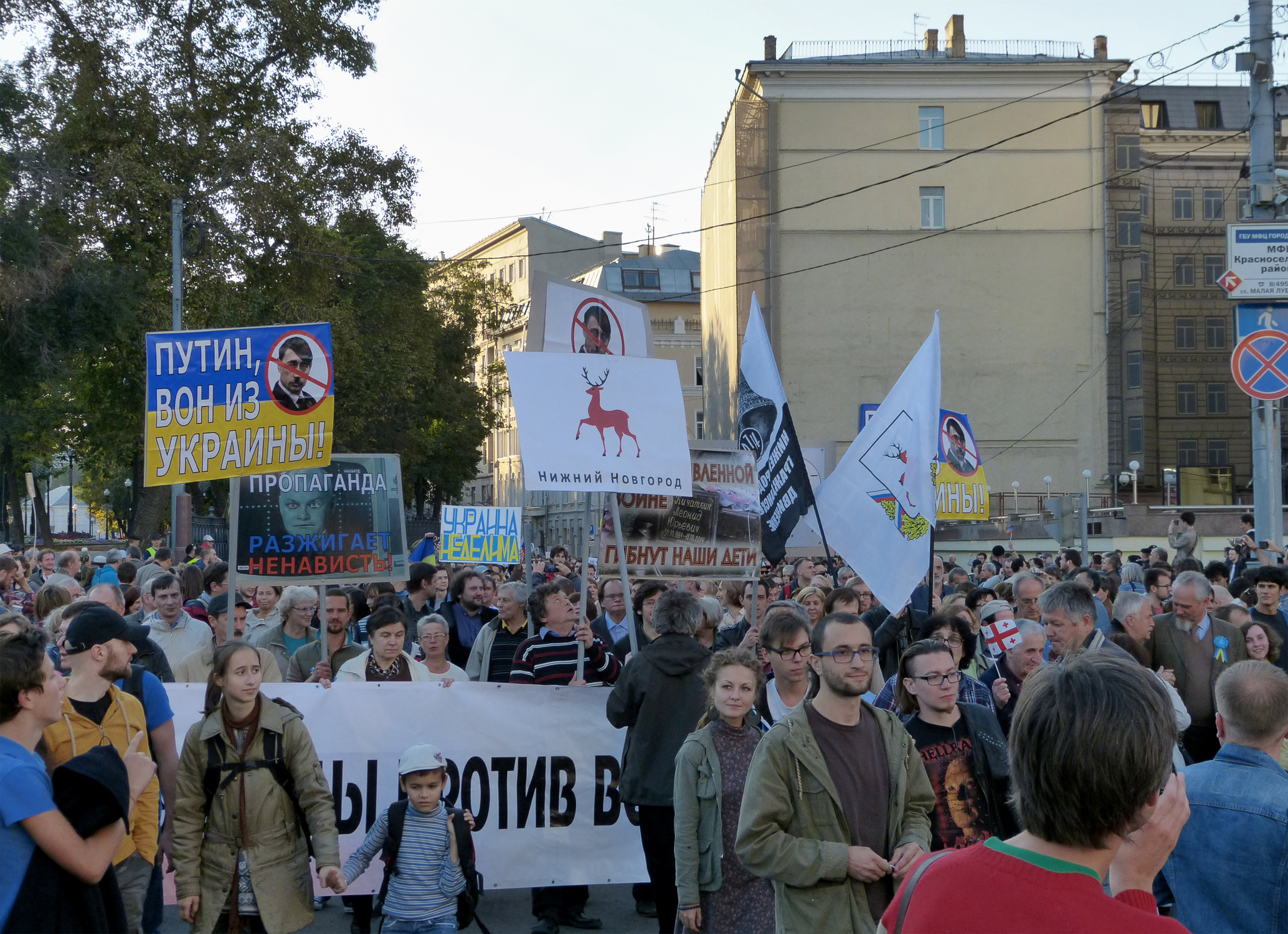 Общероссийский марш мира против вторжения путинских войск на Украину. Москва, 21 сентября 2014 года, Сретенский бульвар у поворота на проспект Академика Сахарова. В правой части кадра среди участников шествия — историк Андрей Борисович Зубов. На плакате изображена карикатура на телеведущего Дмитрия Киселёва.